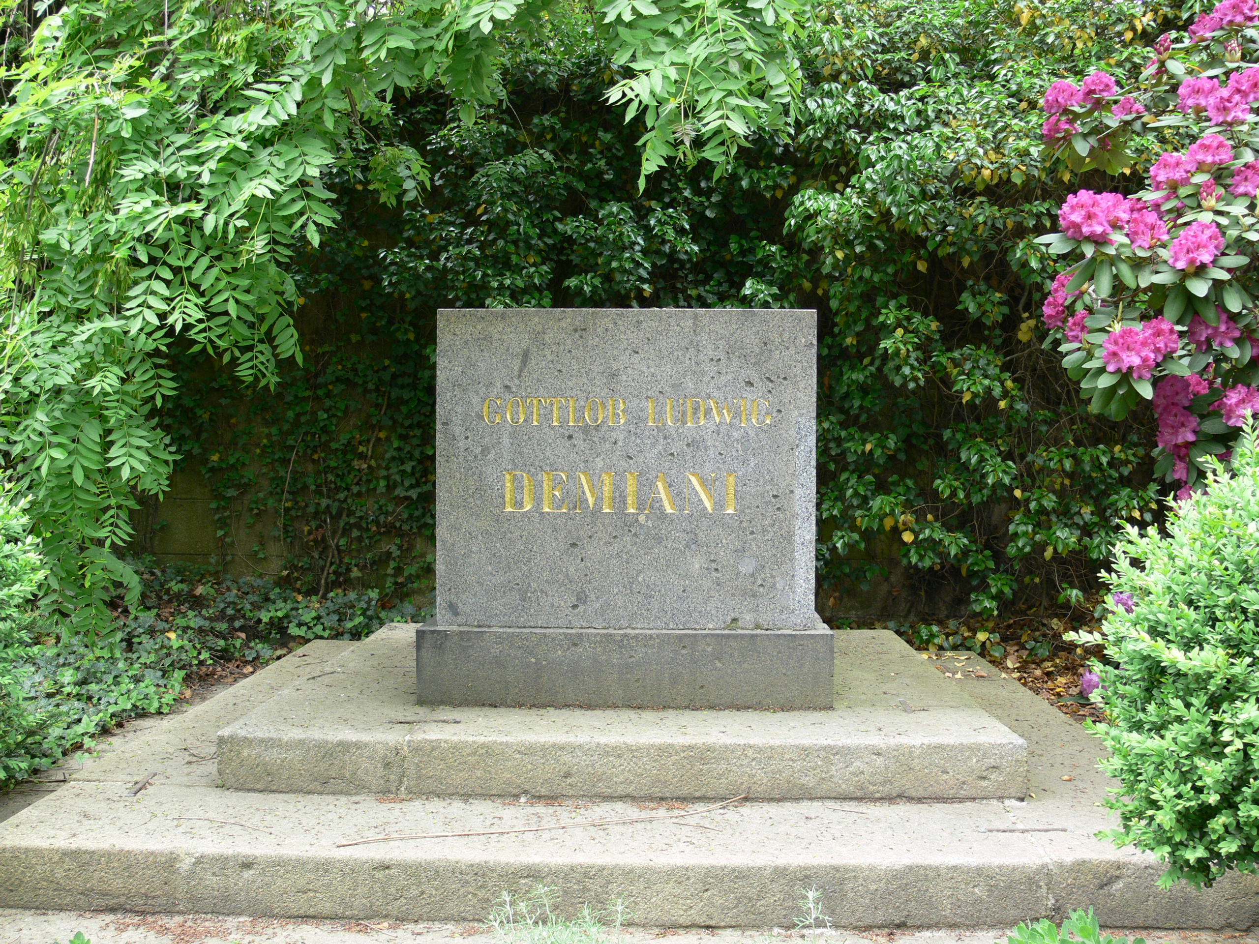 Grabmal Gottlob Ludwig Demiani (1786-1846), Bürgermeister 1844–1846, Städtischer Friedhof Görlitz